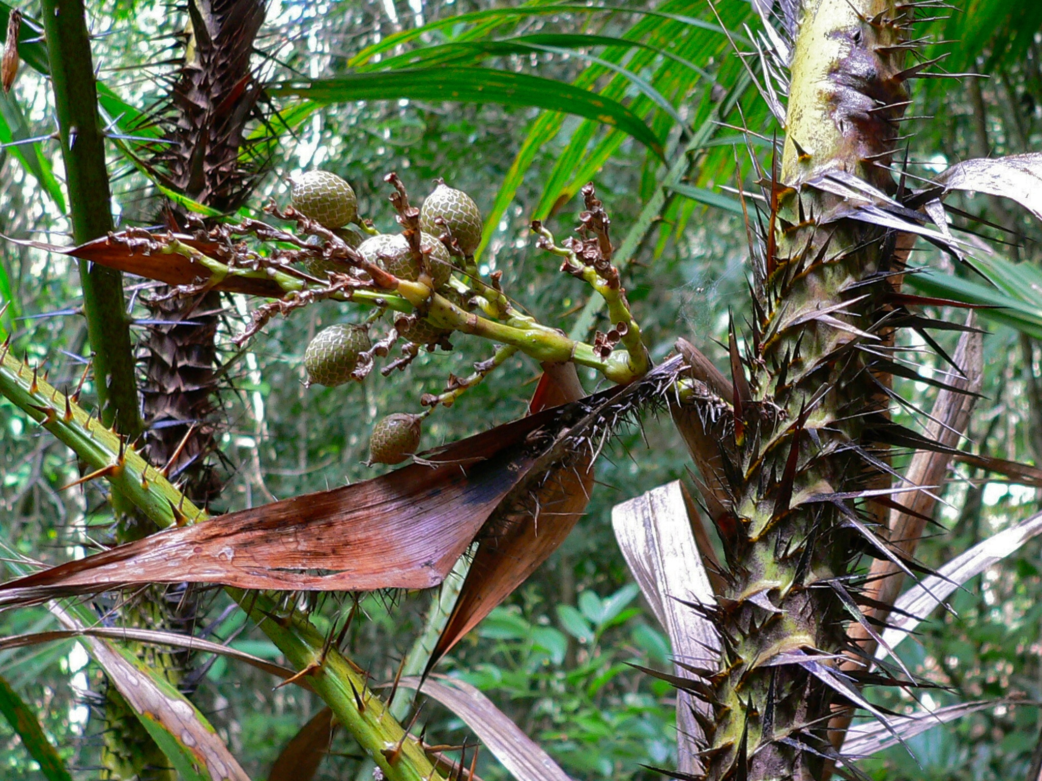 Khao Yai NP, THAILAND